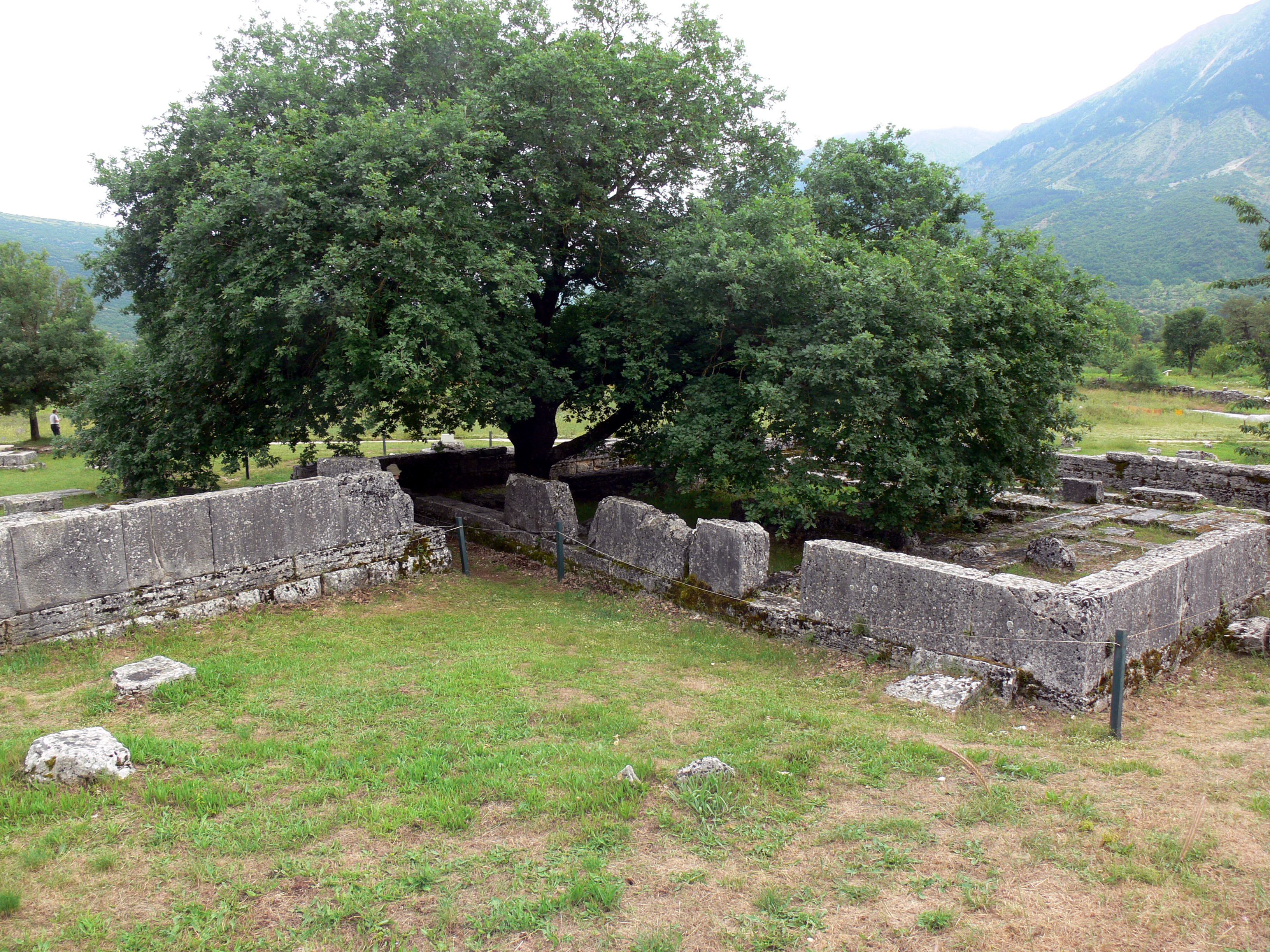 Zeusheiligtum in Dodona mit (Orakel-)Eiche